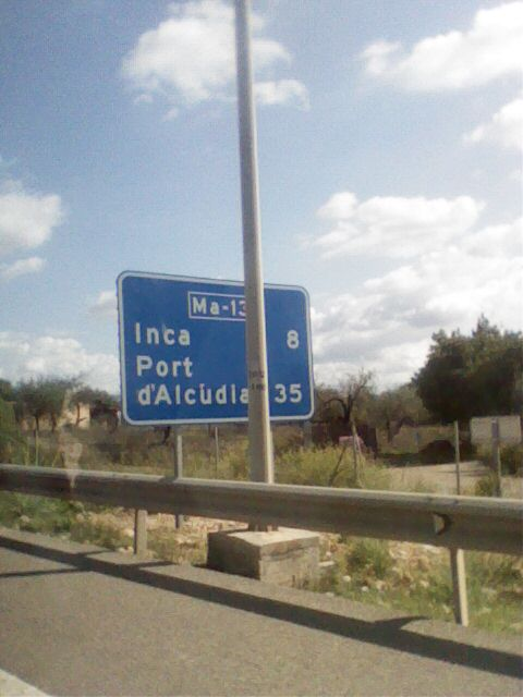 Cartel de la autovía Ma-13